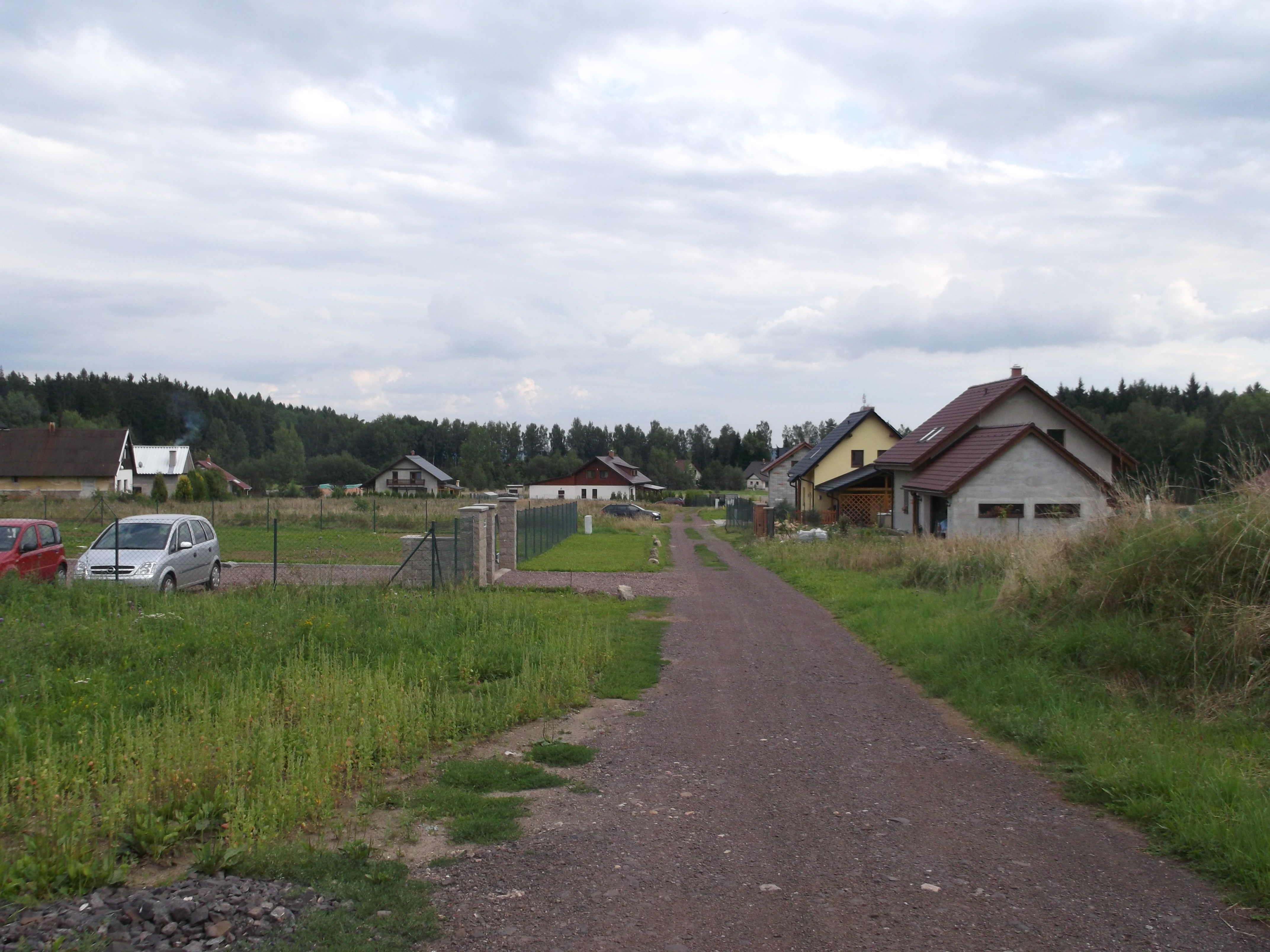 Horní Nemojov - pohled na střední část obce